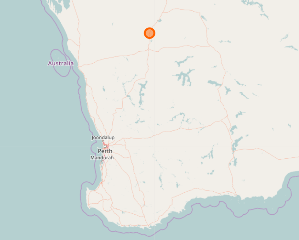 Luoghi in cui è stata scoperta attività ndranghetistica in Australia